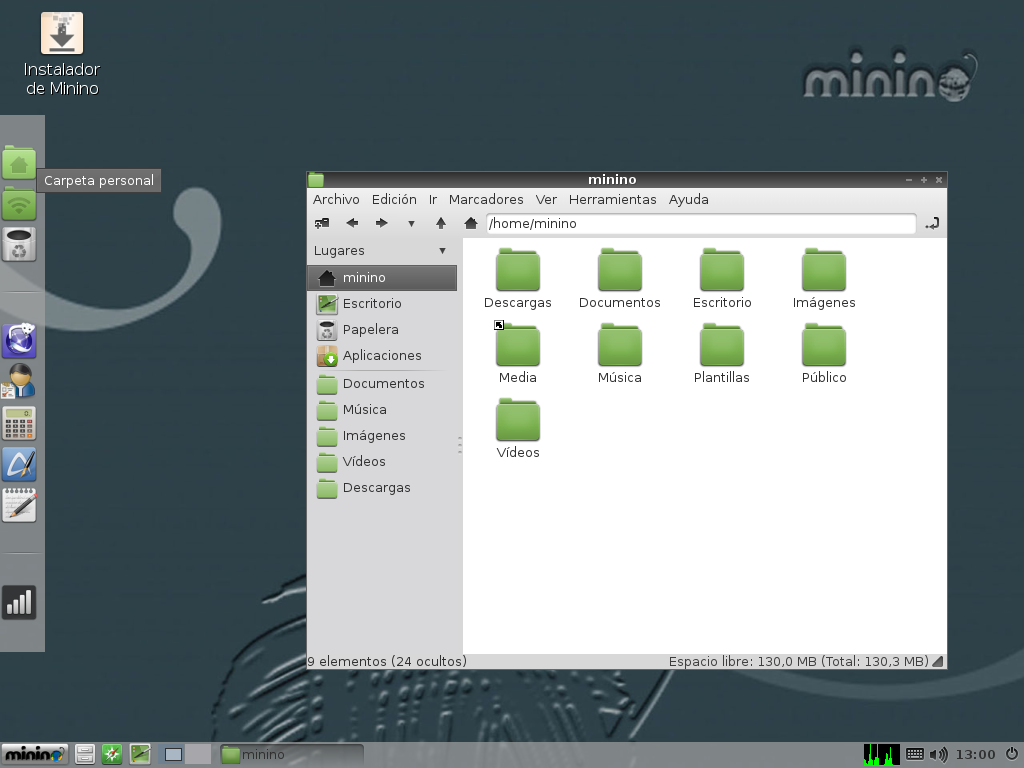 Captura Escritorio Galpon Minino 2.0